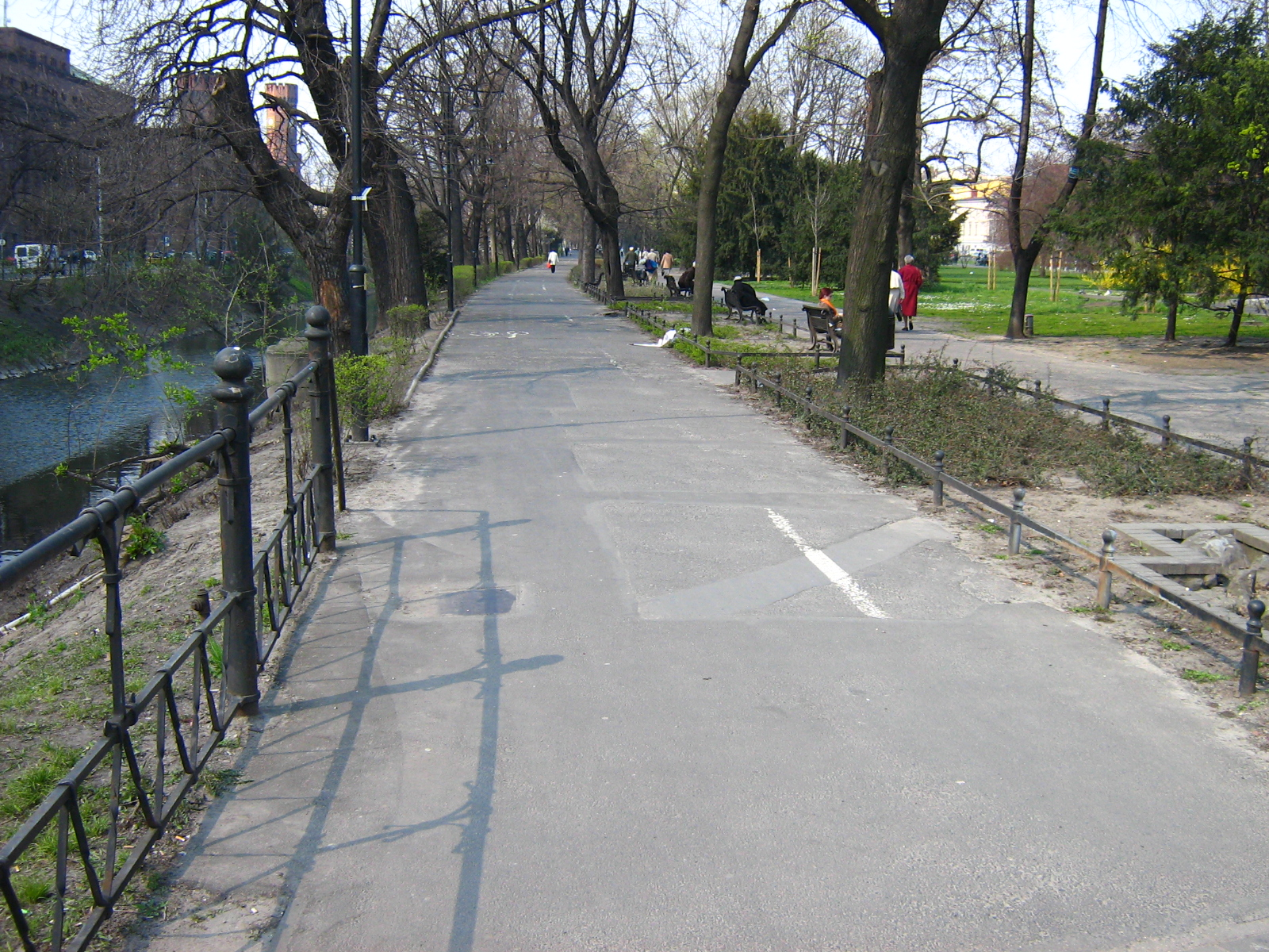 Bicycle path (ścieżka rowerowa), Podwale, Wrocław, Poland